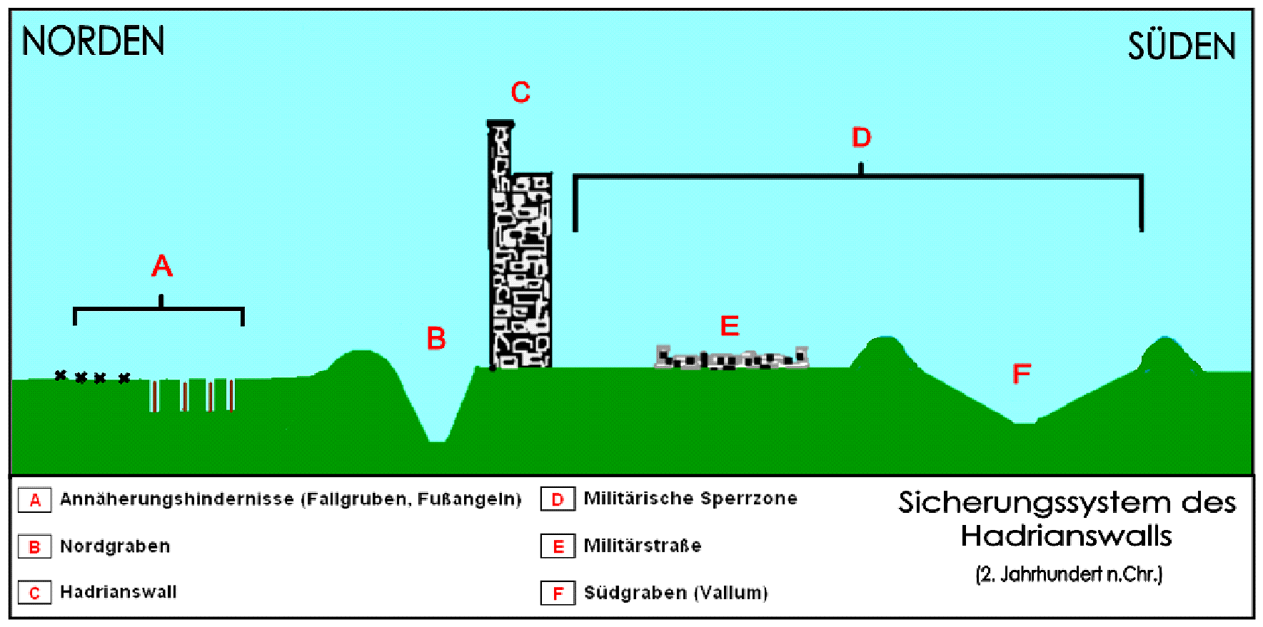 Schnitt d.d. Sicherungssystem des Hadrianswalls (GB), Zustand nach Vollausbau im späten 2. Jahrhundert n.Chr.